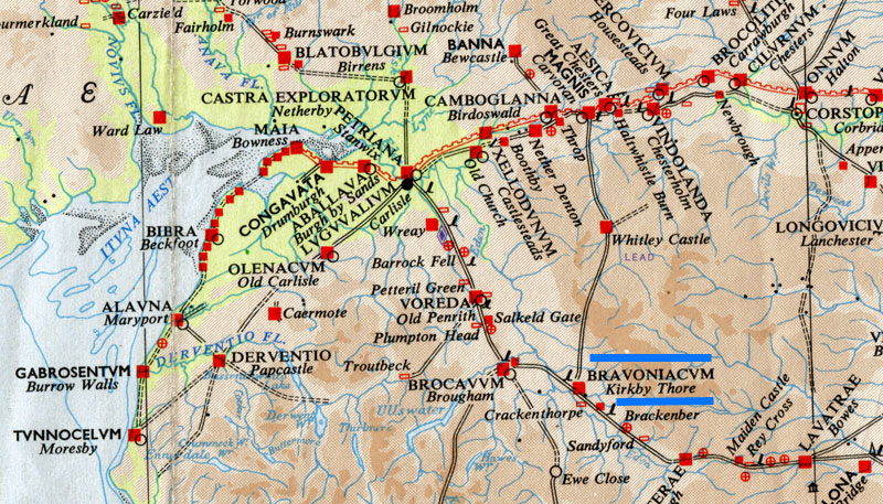 Kirby Thore. Kartenn O.S-R.B